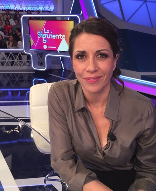 Alicia Borrachero en el programa Lo Siguiente de TVE.